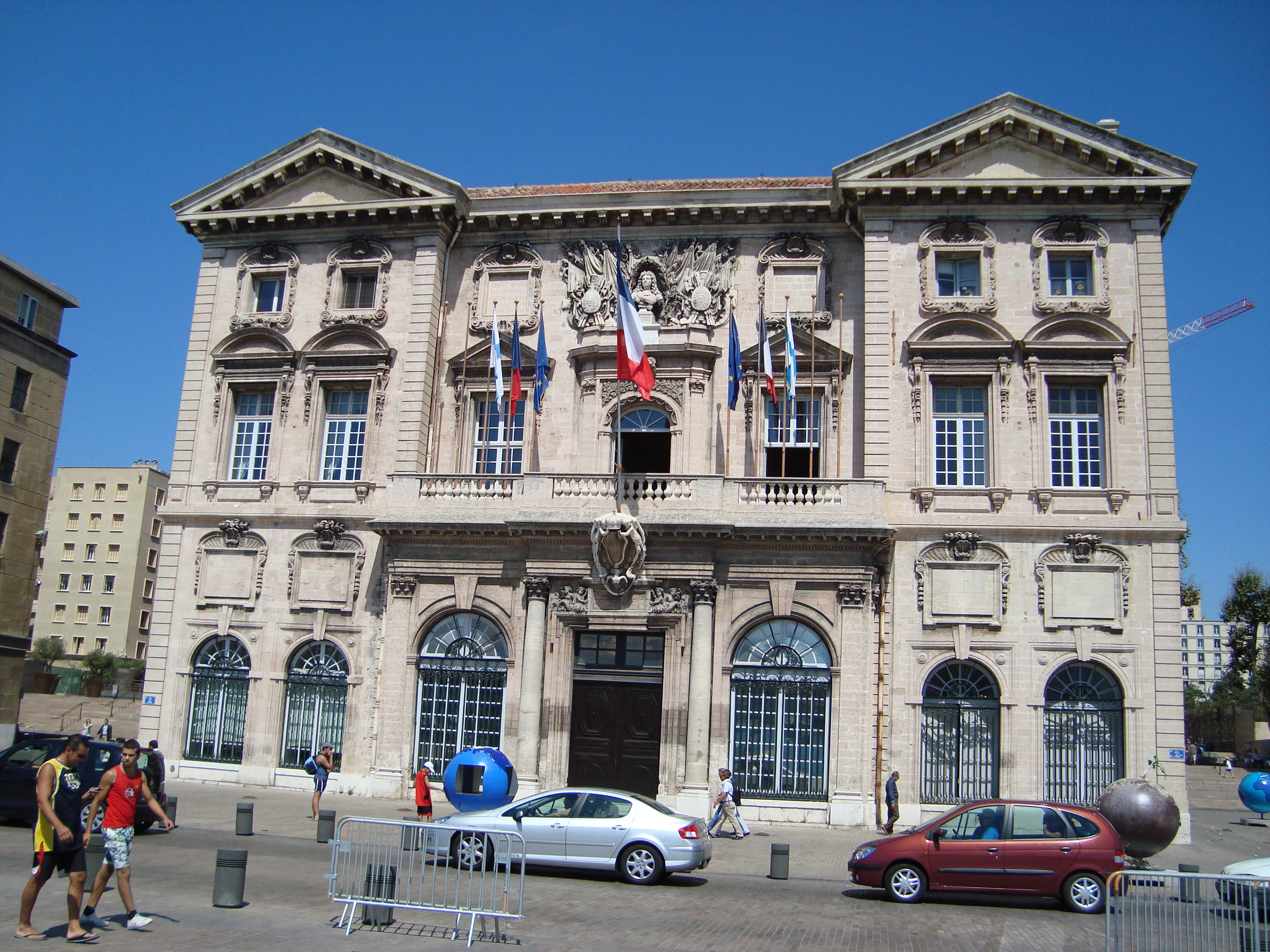 Marseille